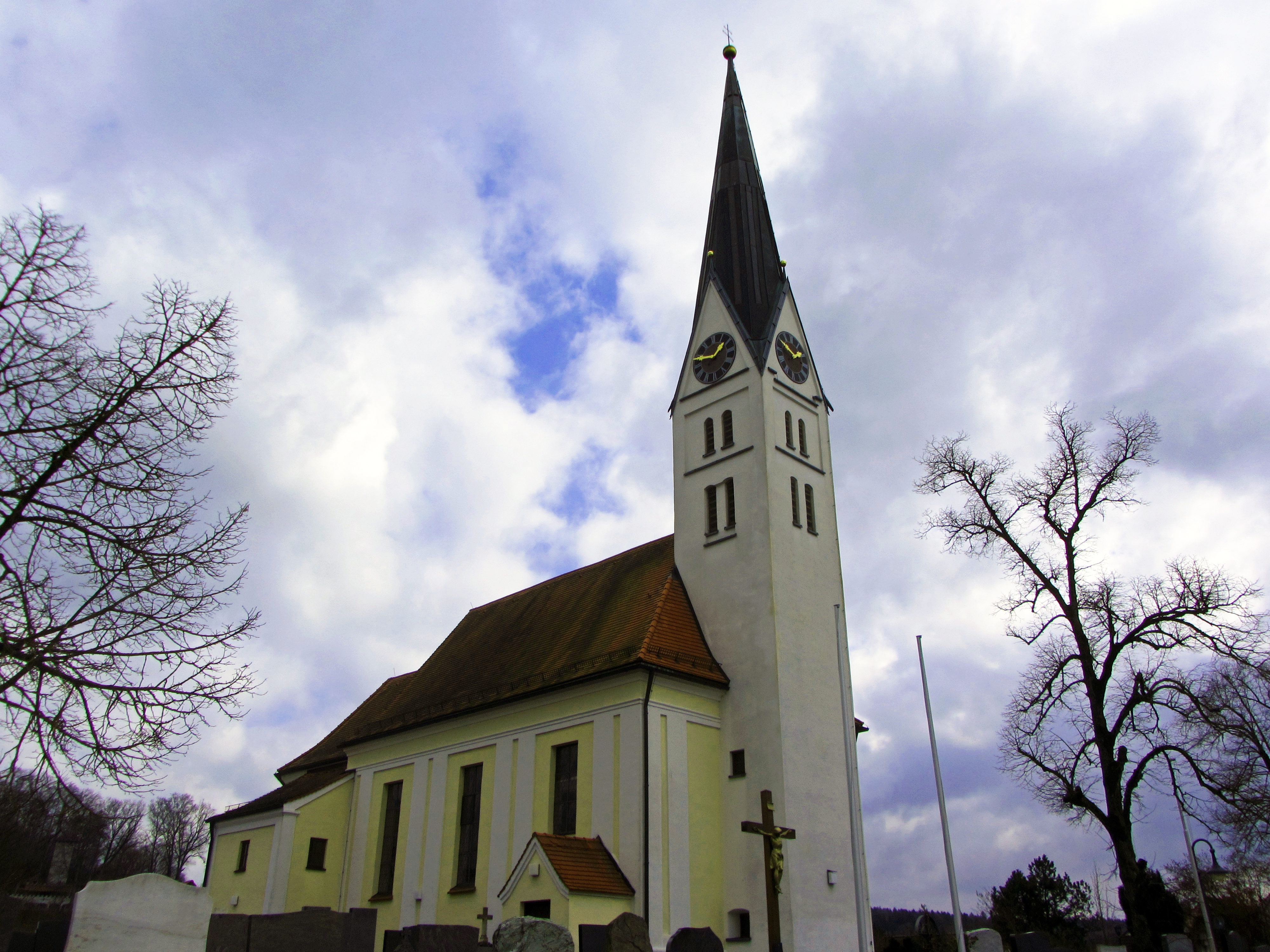 Denkmal Aktennr. D-7-71-162-1 Kirche von Aussen